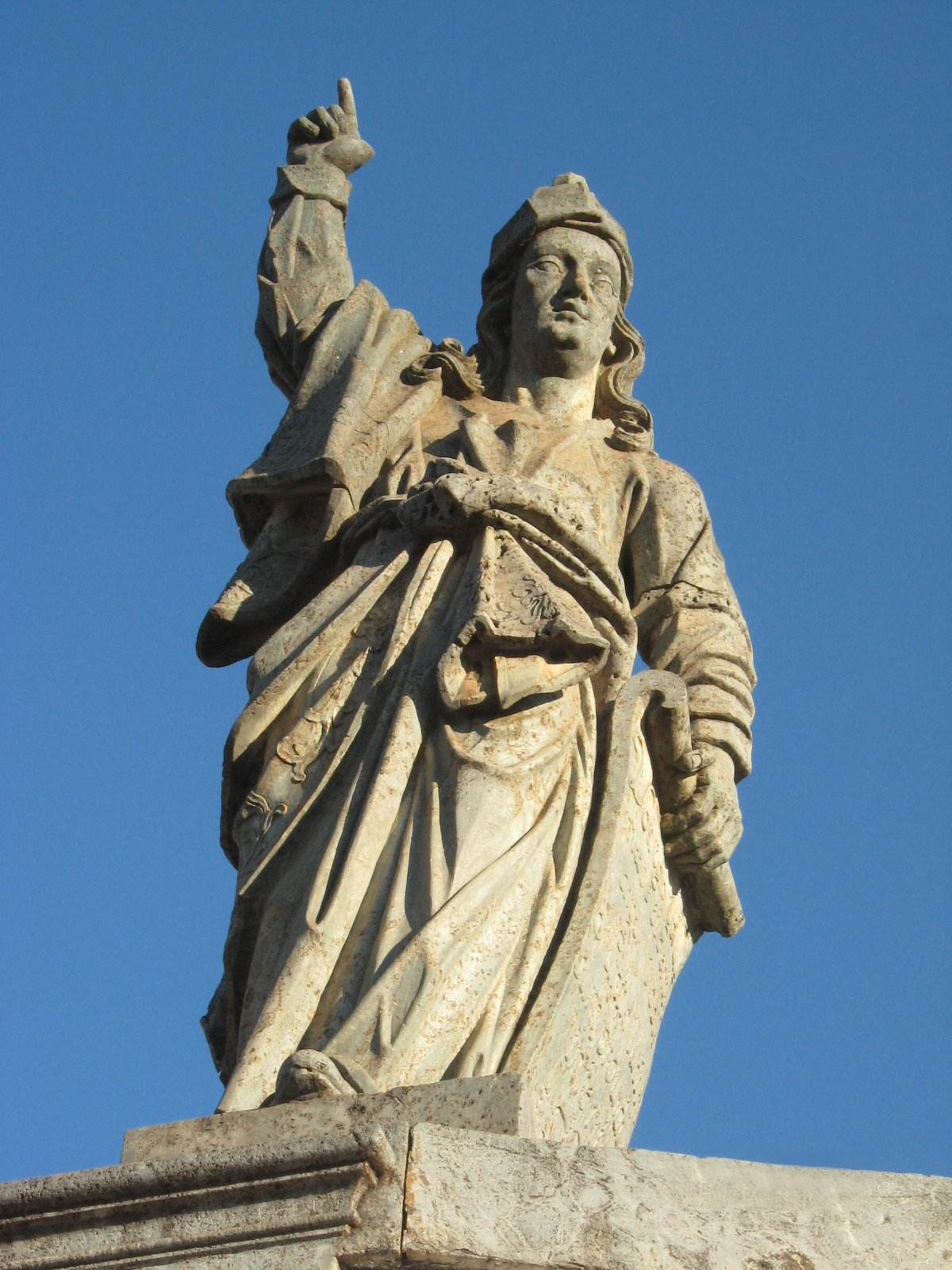 Profeta Abdias - Doze profetas de Aleijadinho Congonhas Minas Gerais